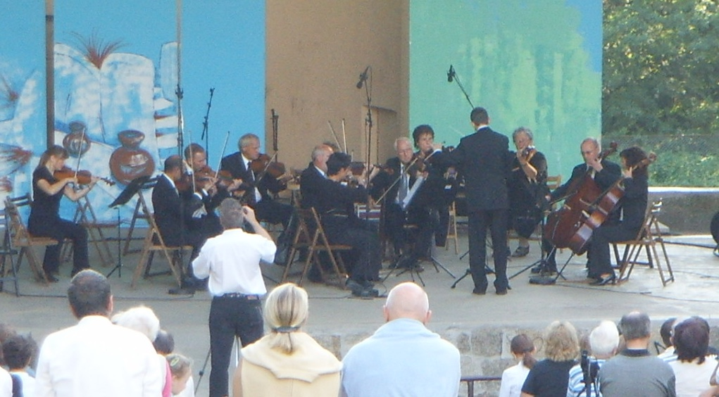 Benefizkonzert Freilichtbühne Zgorzelec, 2006